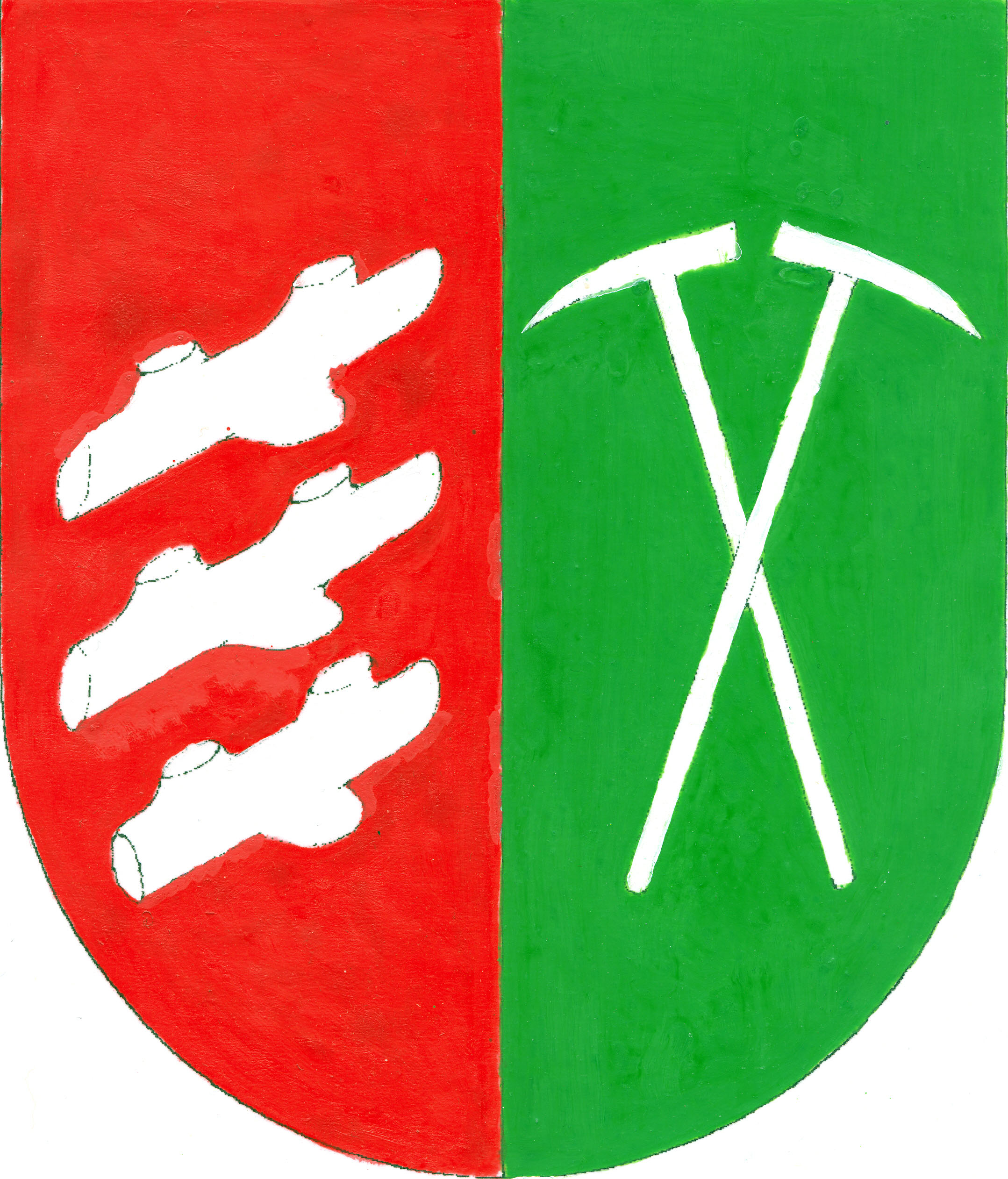 Znak obce Hejná